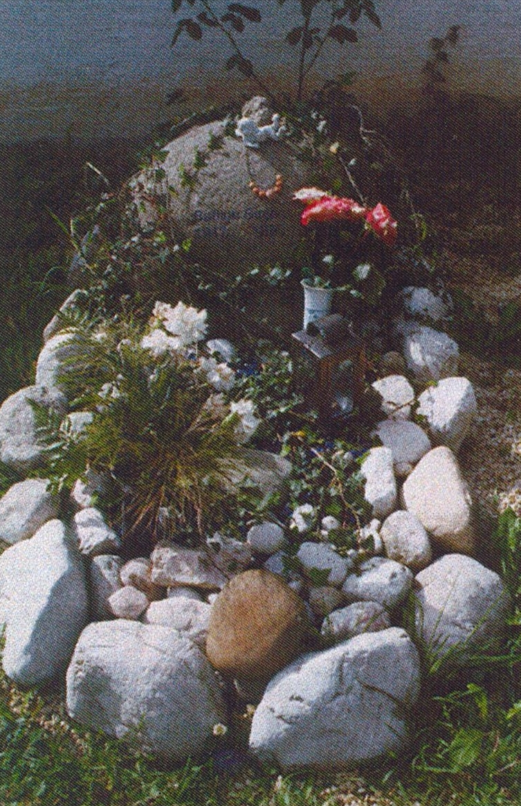 Friedhof Irrsdorf-Sabine Sinjen